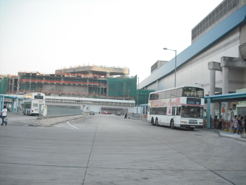 屯門站巴士總站